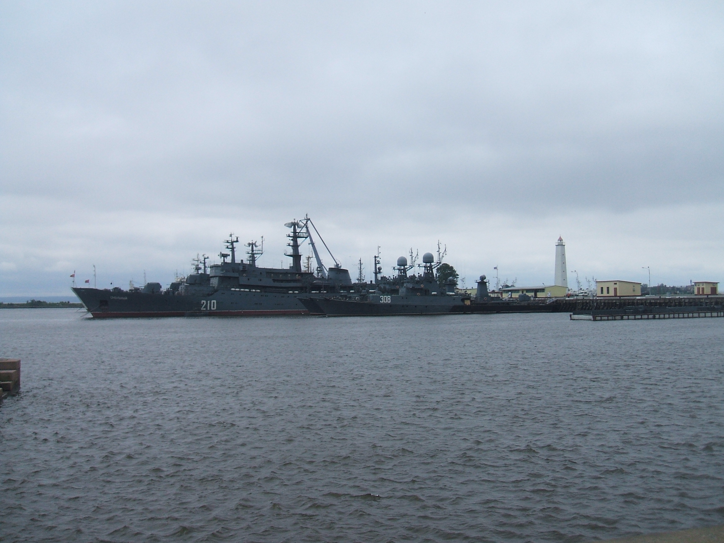 морская база в Кронштадте